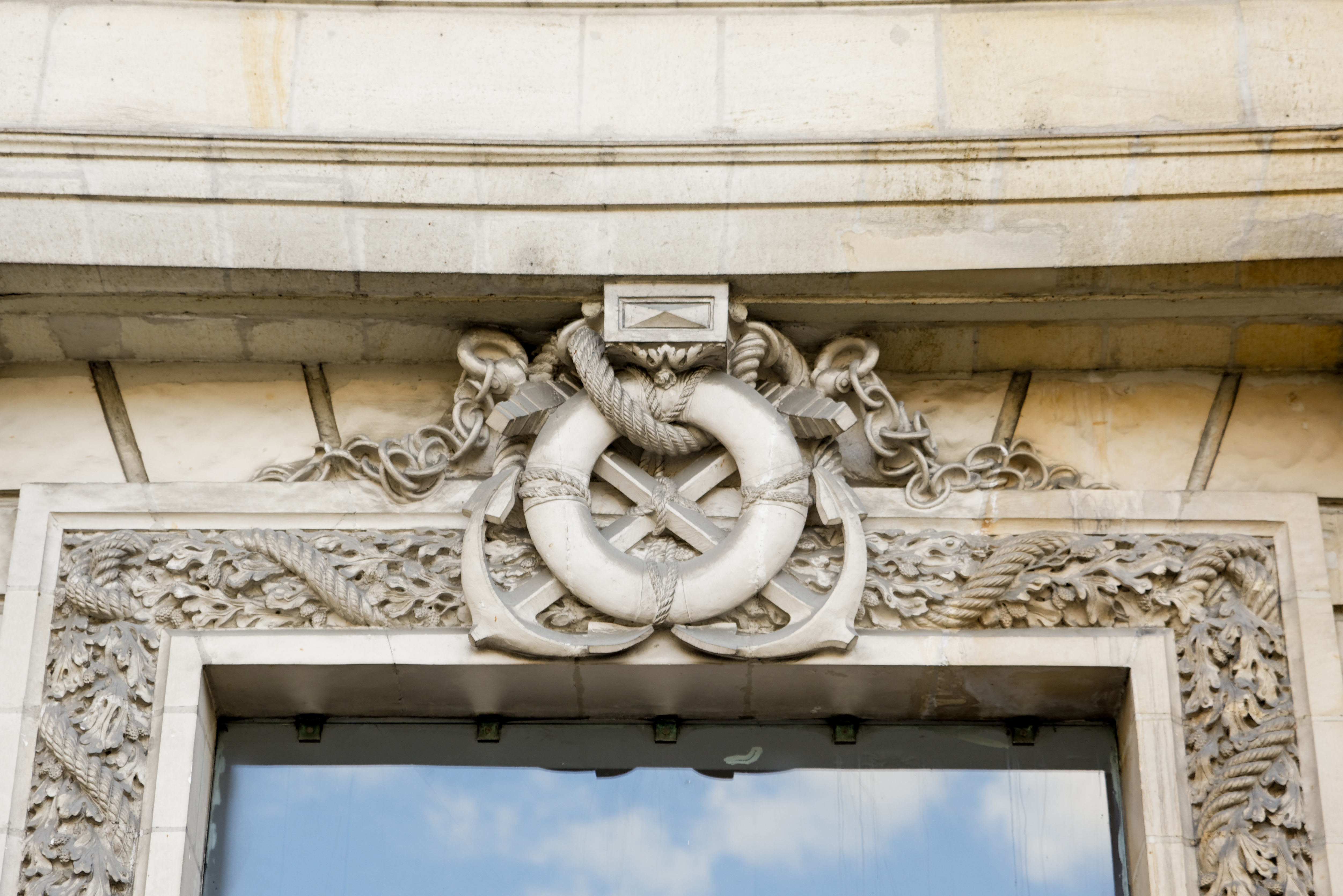 Détail de l'entrée de l'immeuble 3 place Graslin. (Nantes, Loire-Atlantique, Pays de la Loire, France)